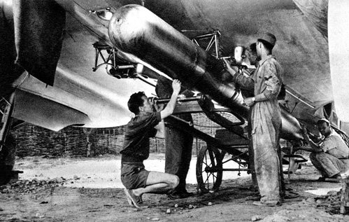 Savoia-Marchetti SM.79 durante la IIWW